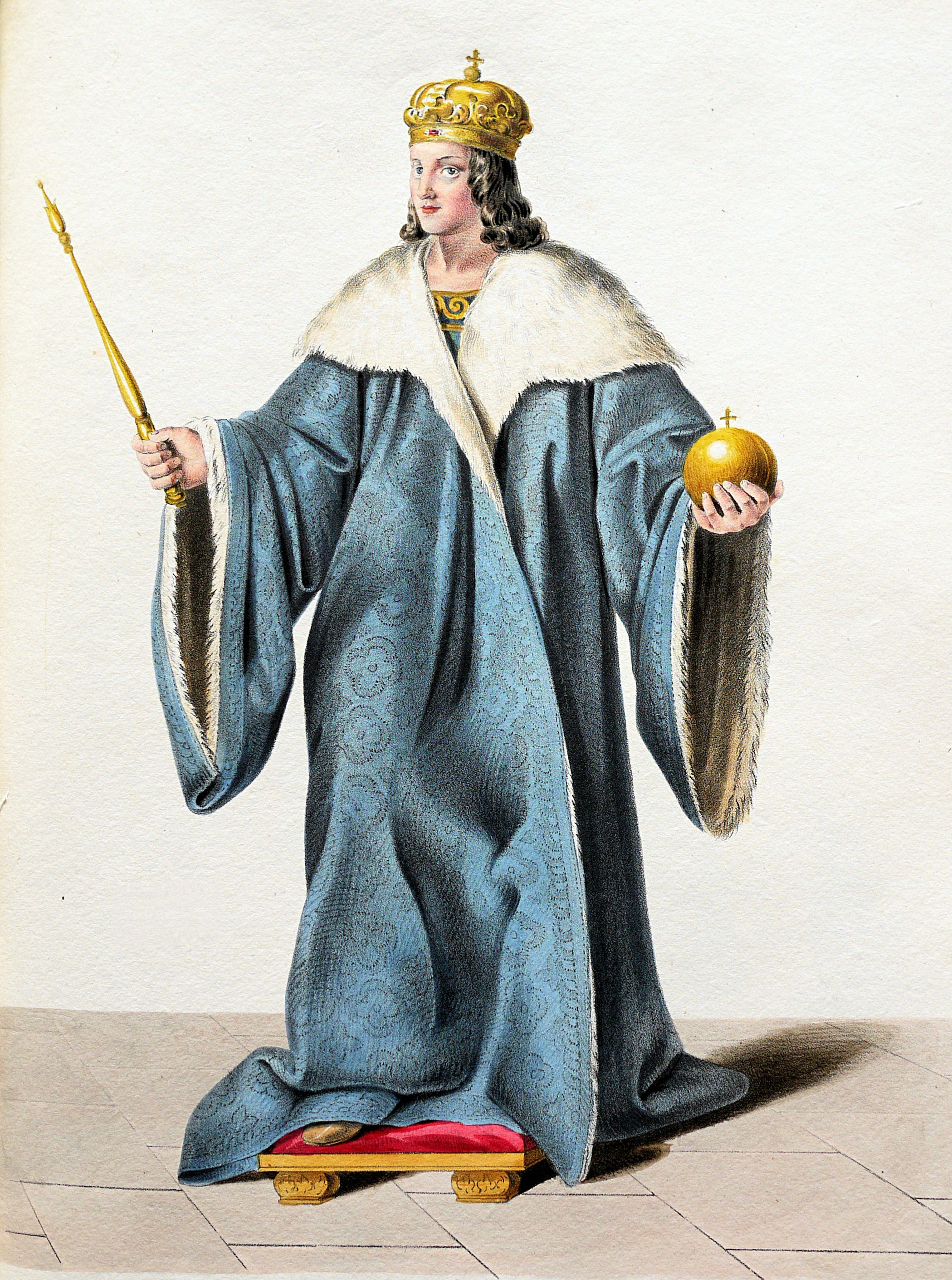 Ladislaus III. das Kind (1194-1205), König von Ungarn etc. Lithographie von Josef Kriehuber nach einer Zeichnung von Moritz von Schwind aus Ungerns Erste Heerführer Herzoge und Koenige In einer Reihe von Bildnissen von Bela bis auf Seine Majestät Franz I. Kaiser Von Österreich König Von Ungern &c., &c. Wien : Lithographisches Institut ;ca. 1828